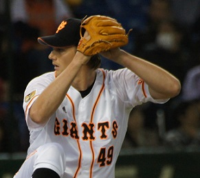 セドン選手